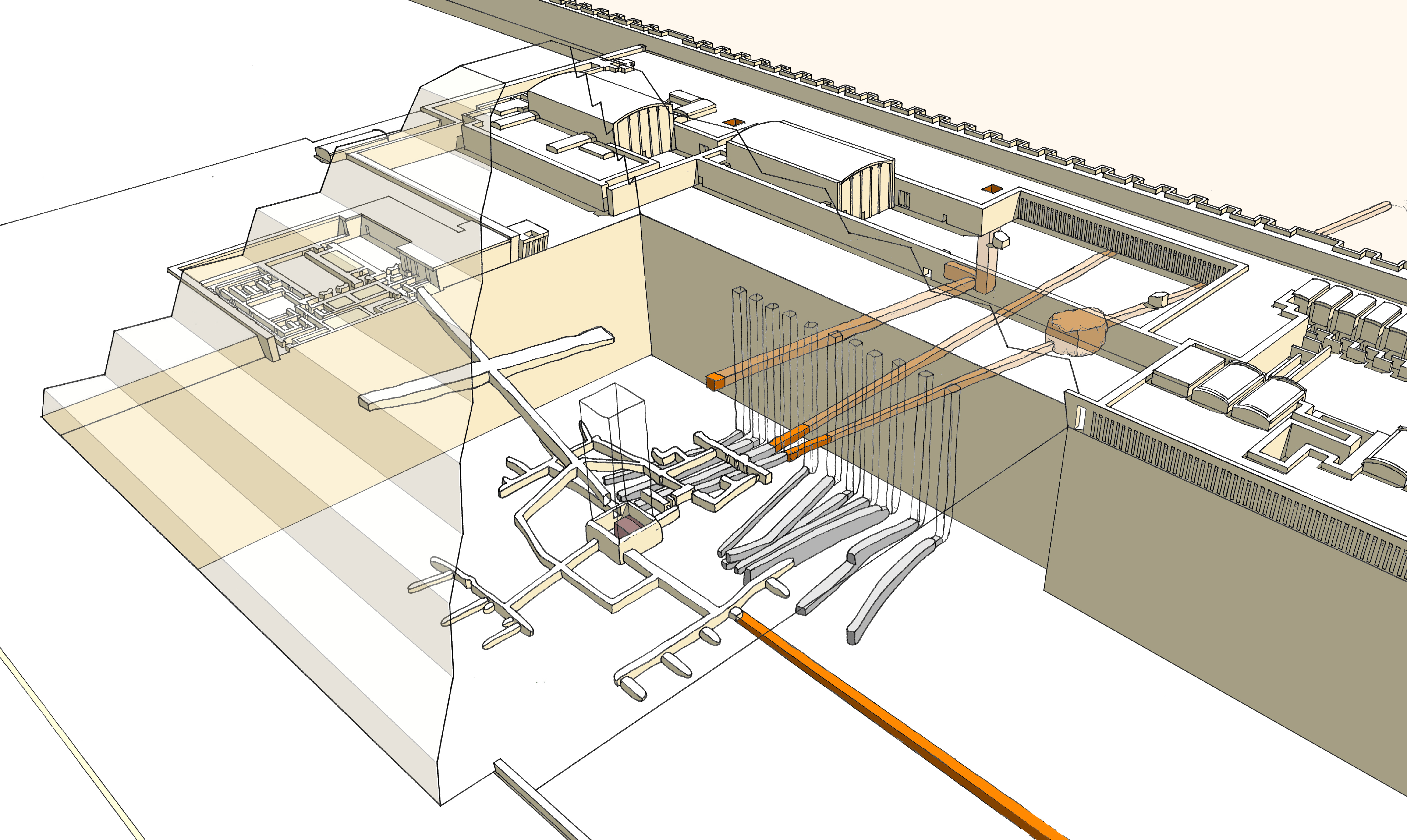 Mise en perspective des découvertes effectuées par la mission lettone de Saqqarah, à l'aide des informations transmises par le directeur Bruno Deslandes